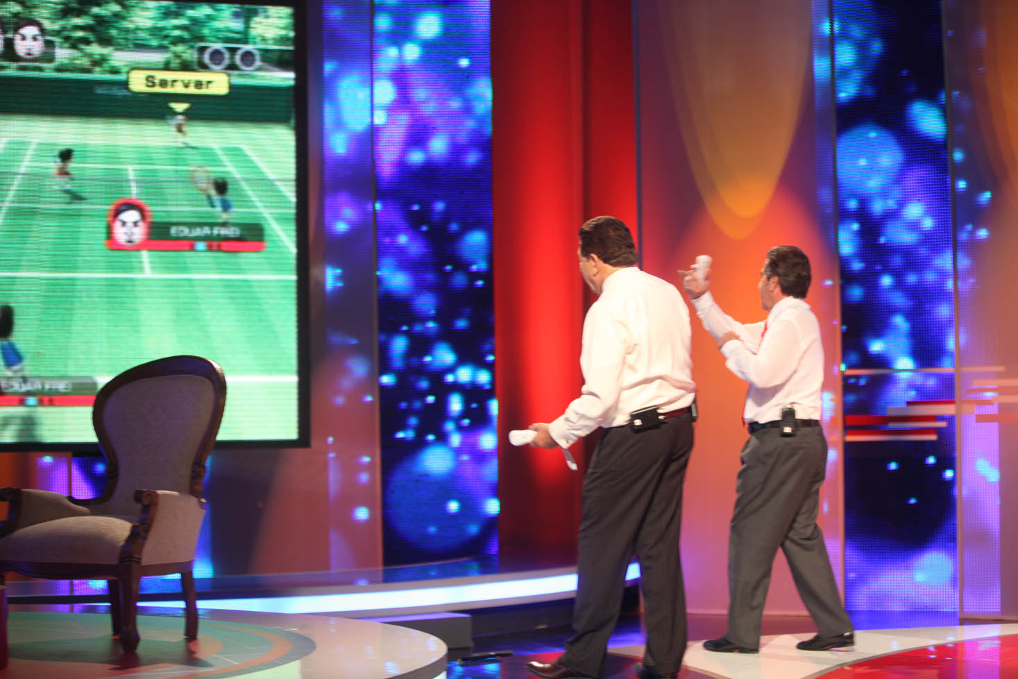 Con Don Francisco